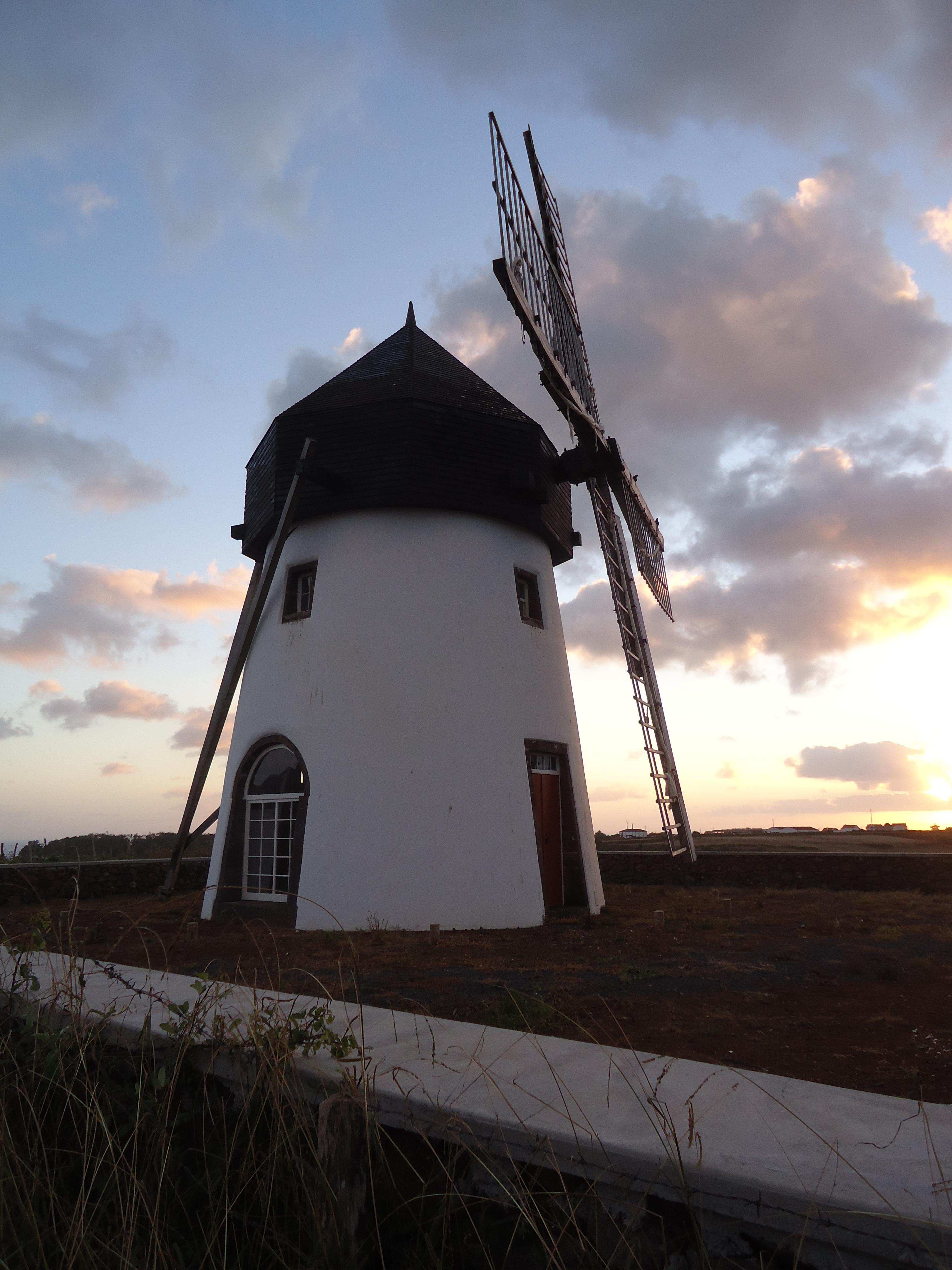 Moinho de vento da Carreira, freguesia de Almagreira, concelho de Vila do Porto, ilha de Santa Maria, Açores, Portugal.